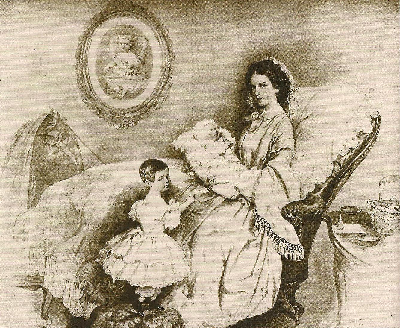 Kaiserin Elisabeth von Österreich mit ihren Kindern Rudolf und Gisela (stehend) im Schloss Laxenburg. An der Wand ein Bild von Sofia, der 1857 verstorbenen Tochter.